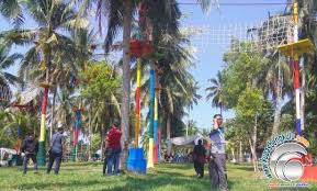 sebuah taman yang ada di pondokkelapa